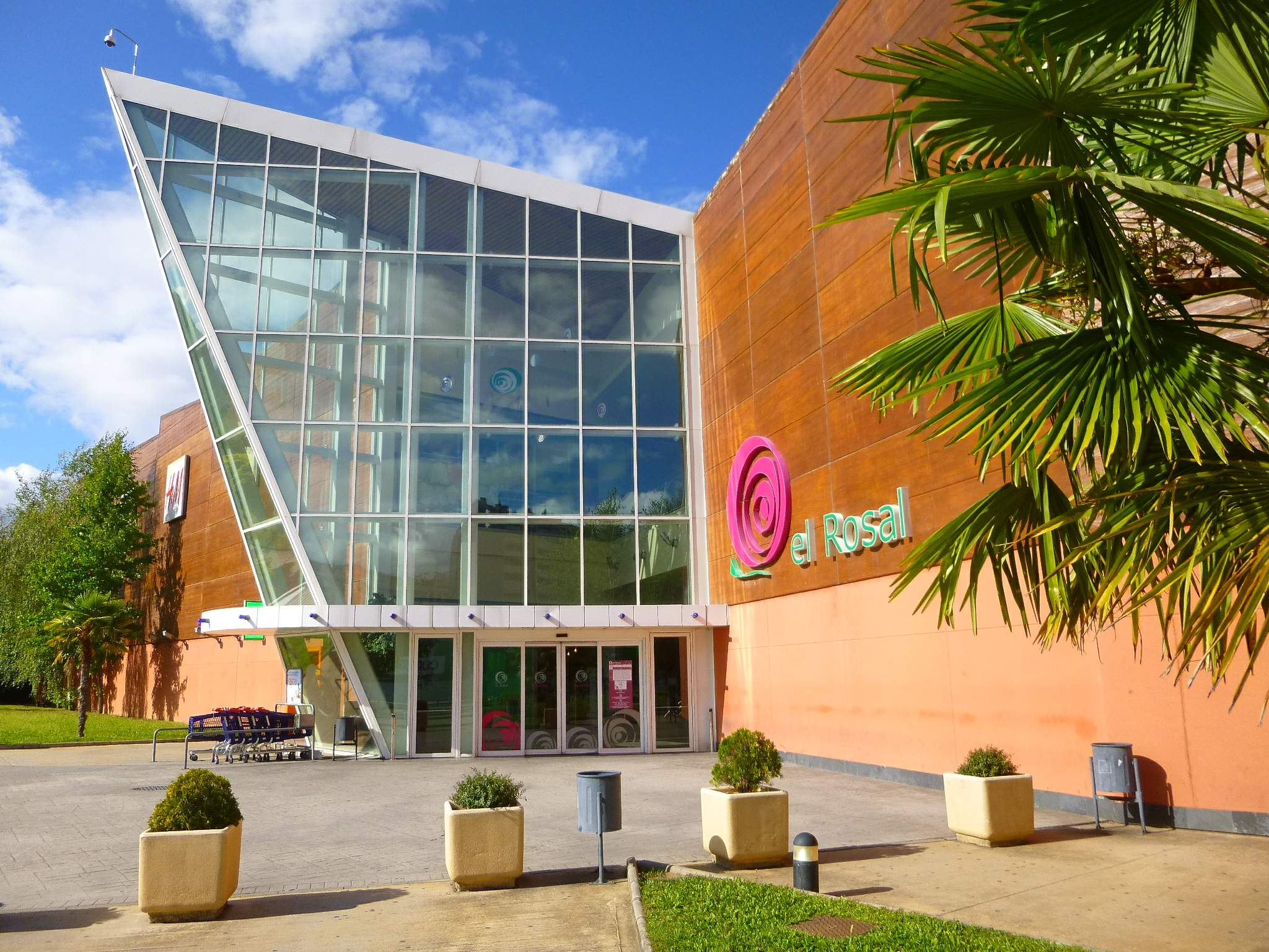 Centro Comercial El Rosal (Ponferrada)